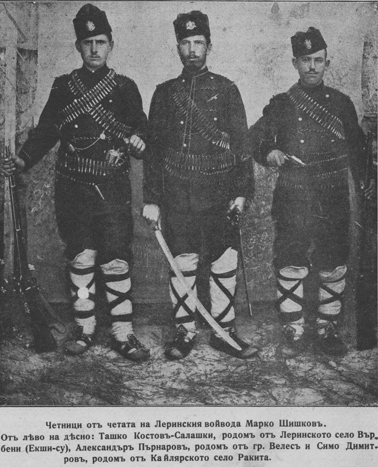 Четници на леринския войвода Марко Шишков. Ташко Костов Салашки от Екши Су (днес Ксино Неро, Гърция), Александър Пърнаров от Велес (днес в Република Македония) и Симо Димитров от Ракита, Кайлярско (днес Олимпиада, Гърция).